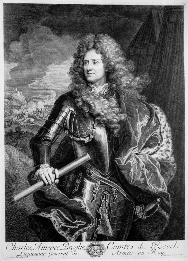 Portrait de Charles-Amédée de Broglie, comte de Revel